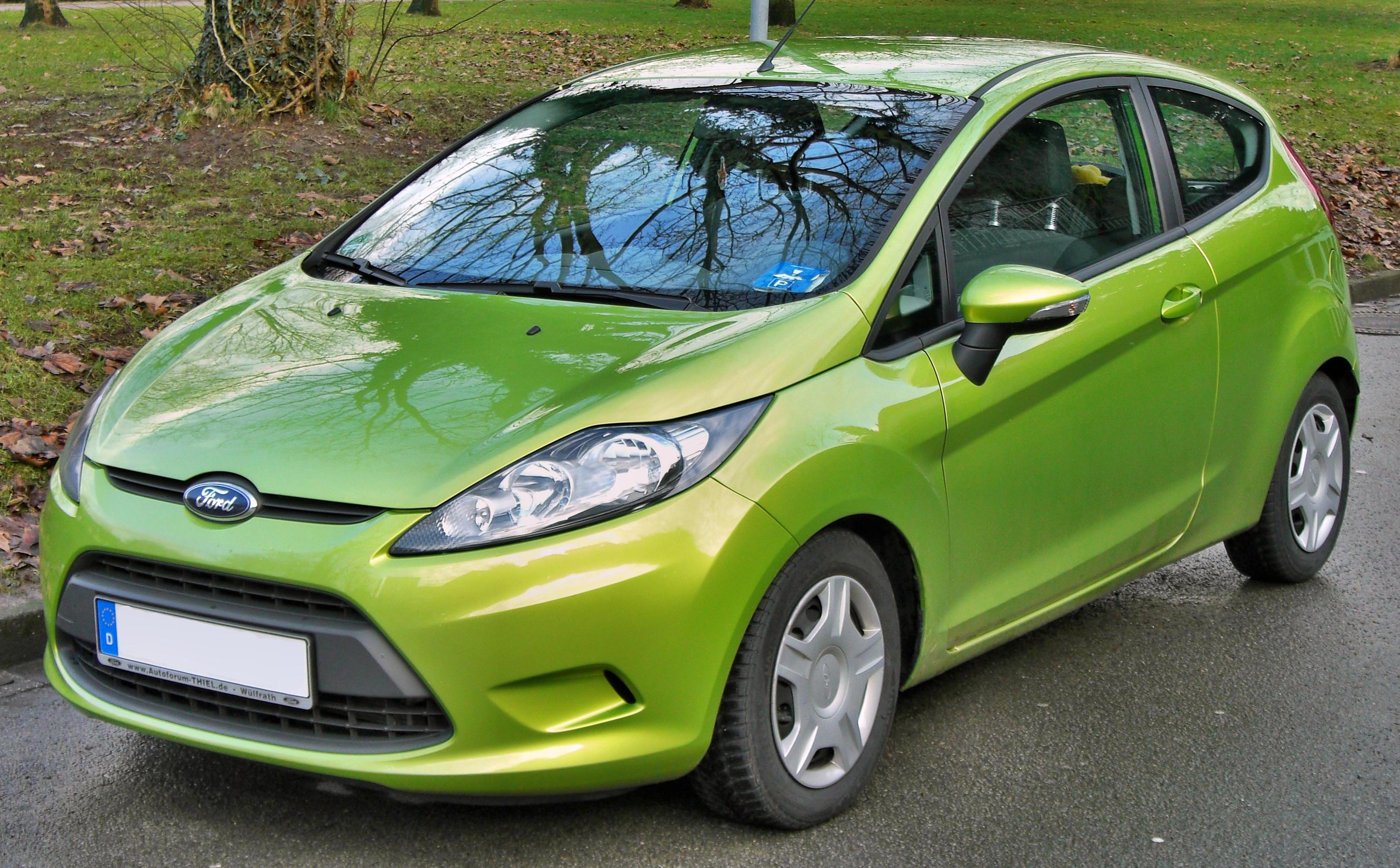 Ford Fiesta VI Trend